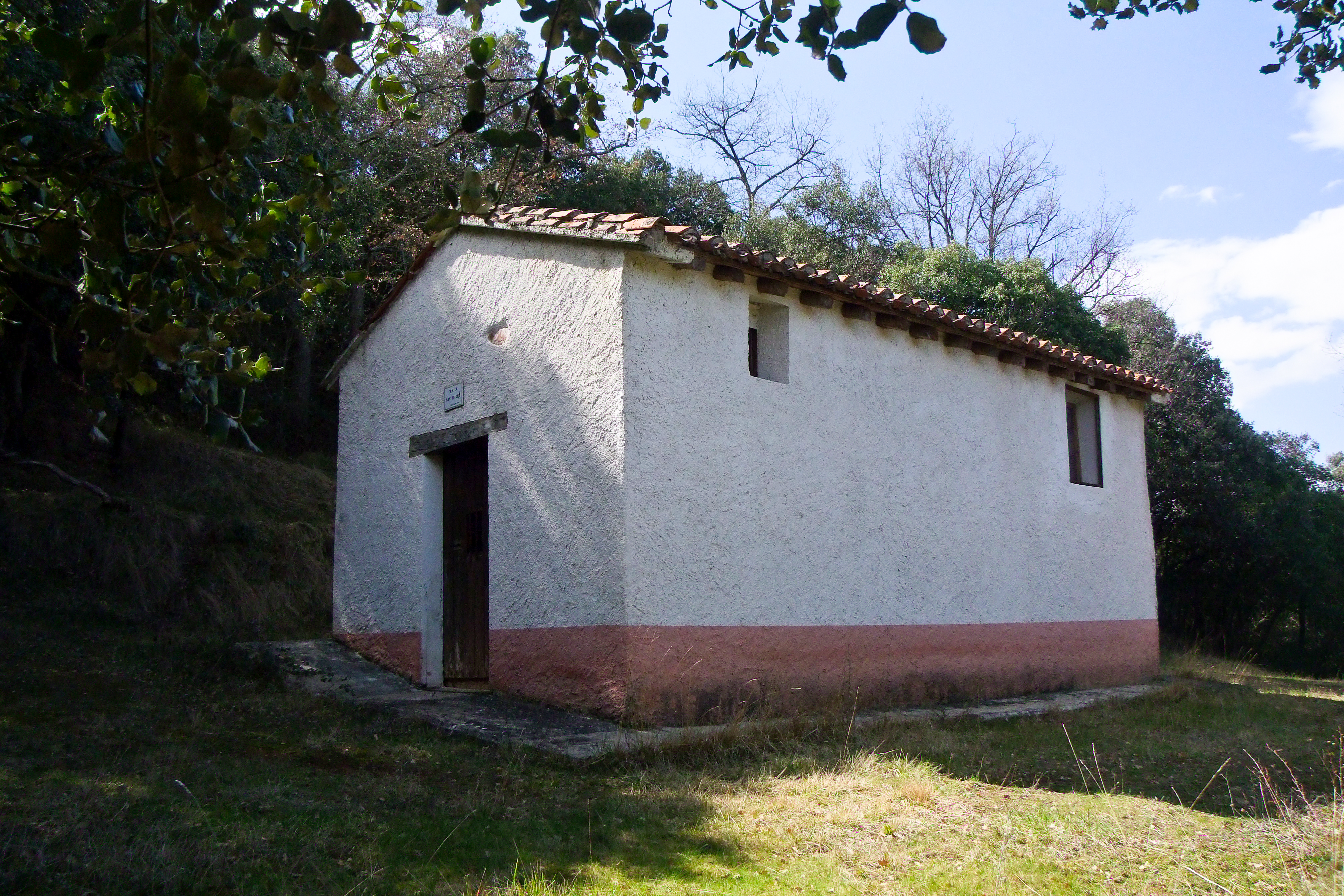 Ermita de San Isidro en la localidad de Estollo, La Rioja - España